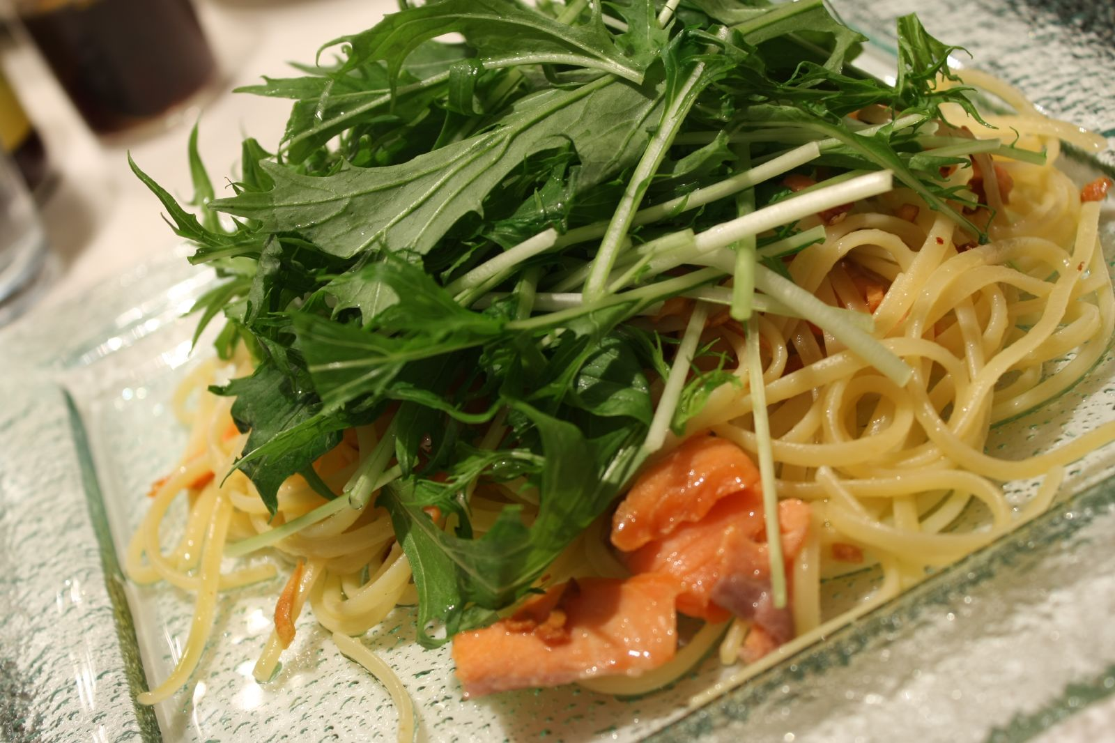 Mizuna and pasta and salmon.